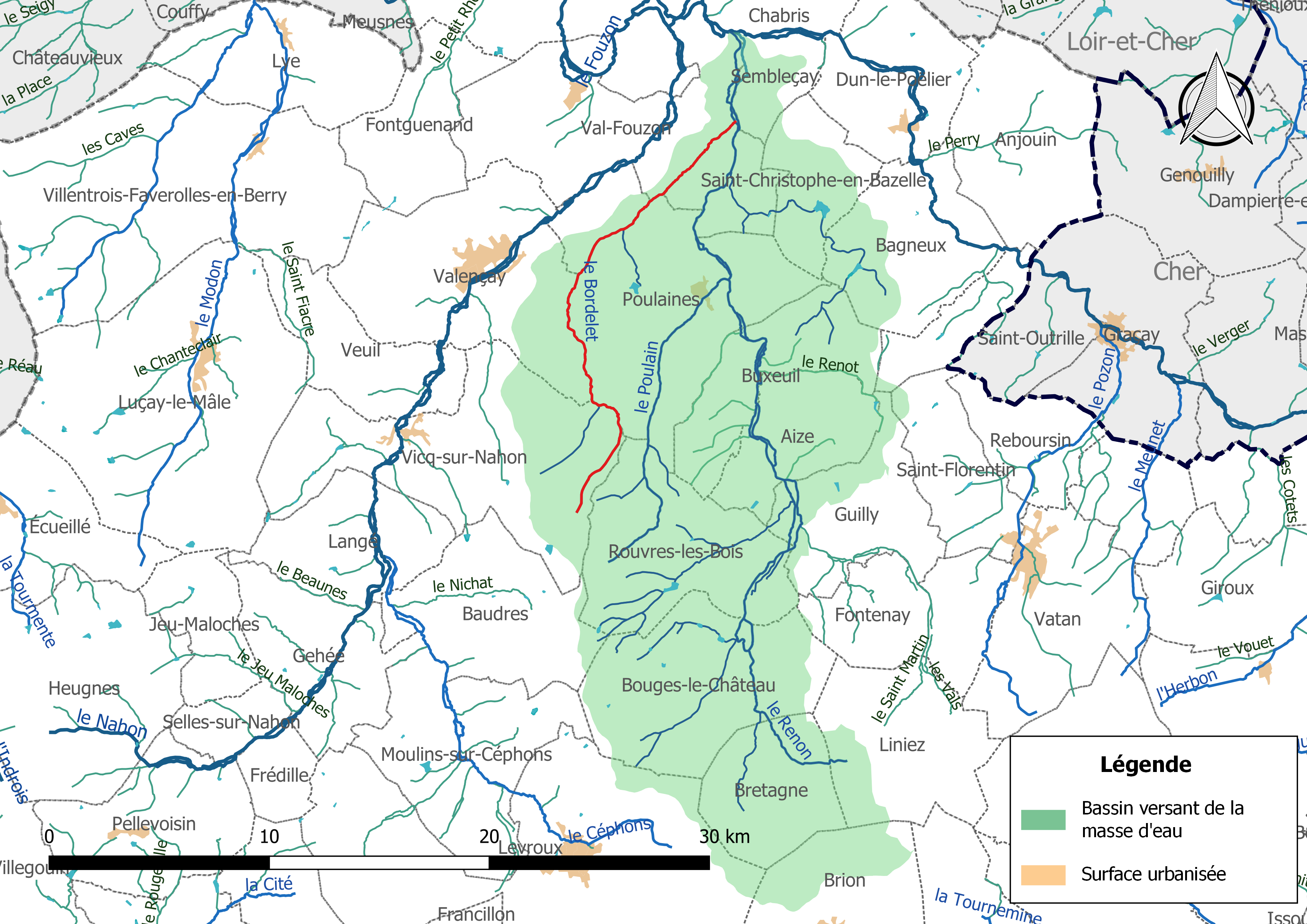 Carte de la masse d'eau « FRGR0346 », avec mise en exergue du cours d'eau « le Bordelet » (en rouge).